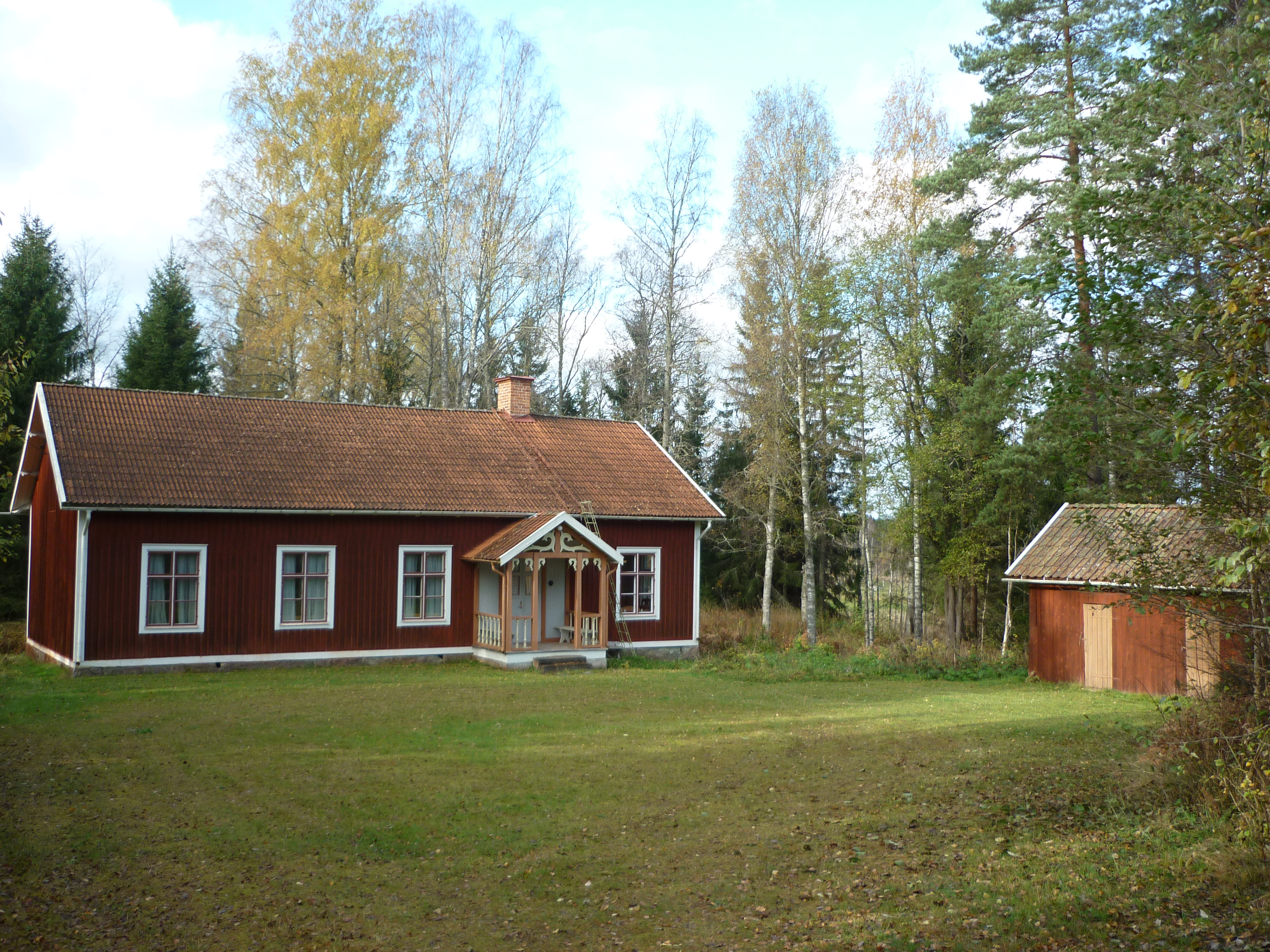 Logen Malma Spira, IOGT-lokal, Gisslarbo, Heds socken, Skinnskattebergs kommun.